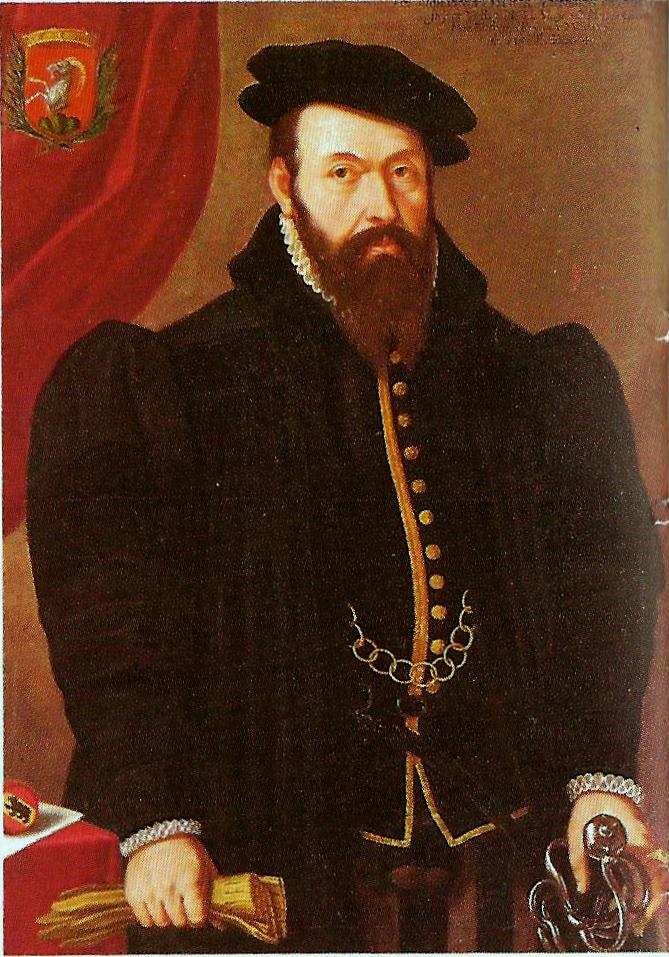 Hans Steiger, Schultheiss von Bern. Aus: Illustrierte Berner Enzyklopädie, S. 126.